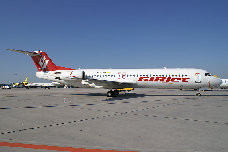 GIRjet Fokker 100 EC-IVO at Stuttgart Airport